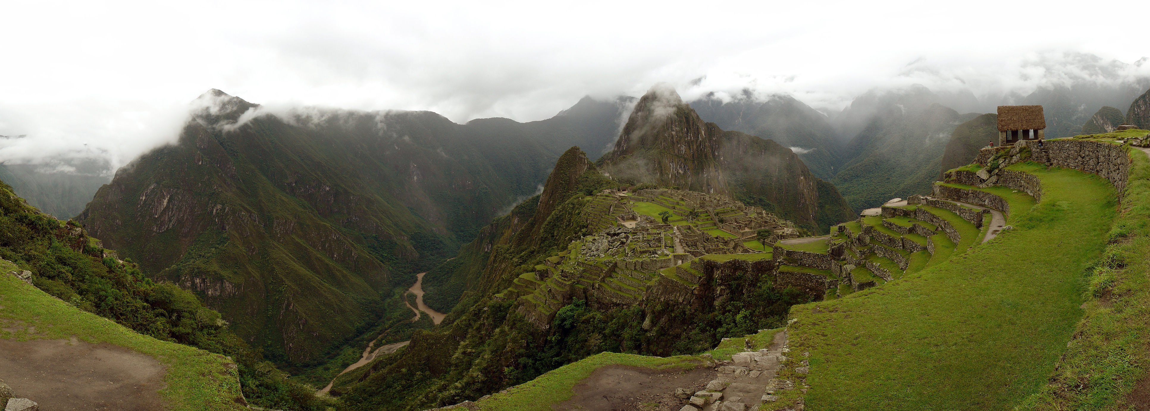 Machu Picchu, Pérou/Peru